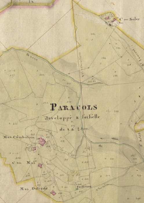 Paracolls en el Cadastre napoleònic del 1812 (Arxius Departamentals dels Pirineus Orientals)